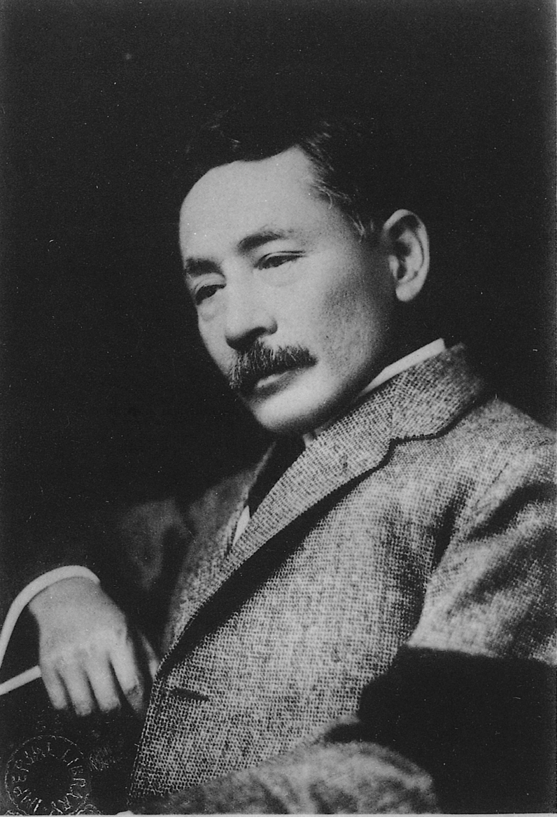 Portrait of Natsume Soseki (夏目漱石, 1867 – 1916)